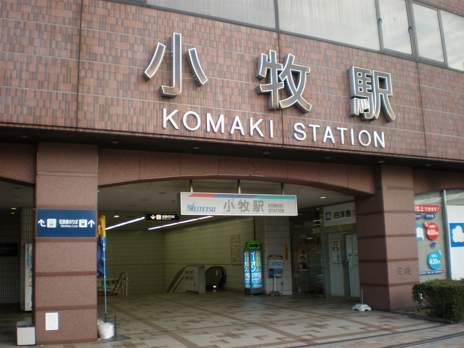 愛知県小牧市にある名鉄小牧駅西口